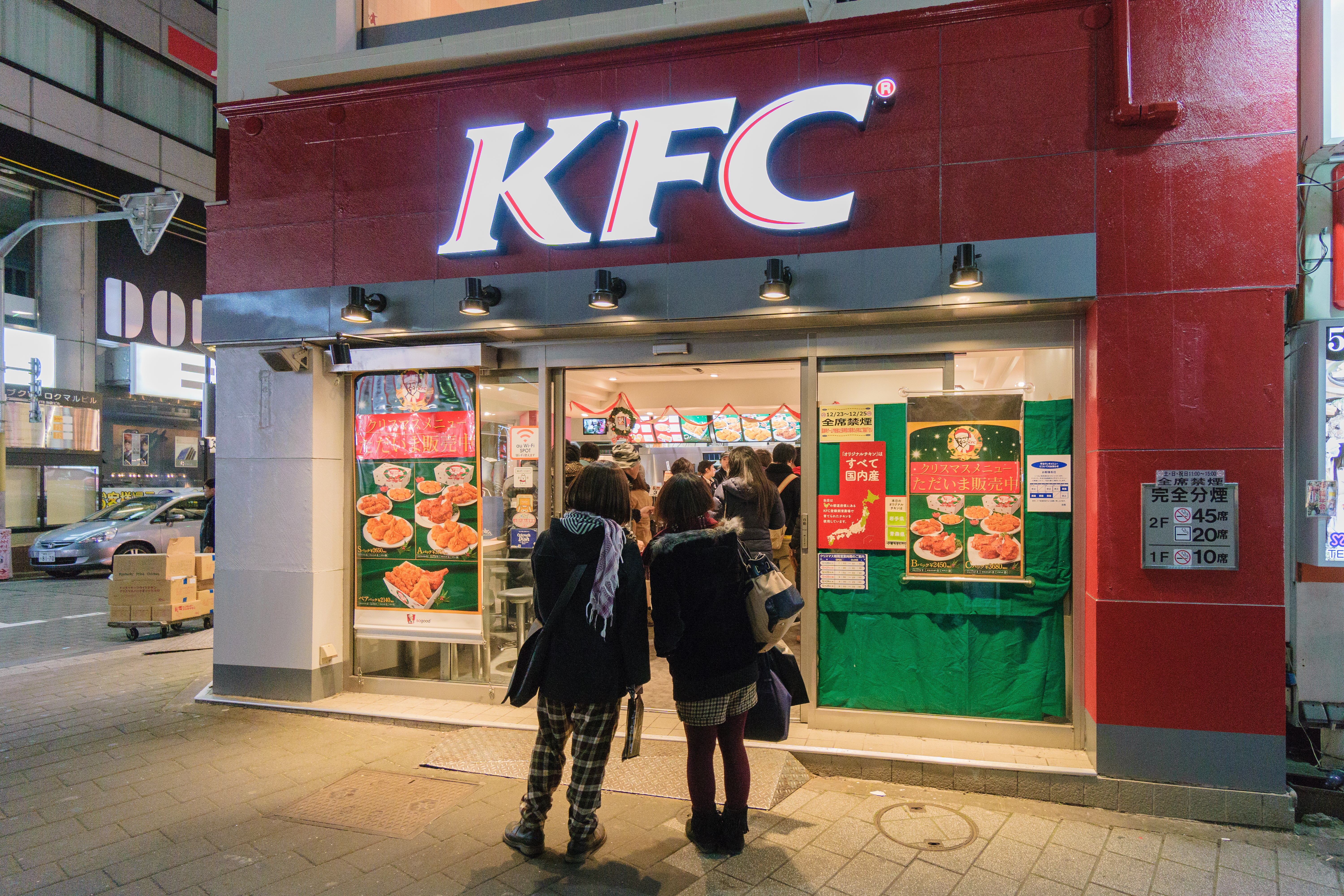 池袋 / Ikebukuro